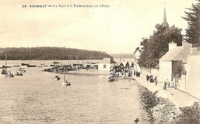 Bénodet : la cale et l'embouchure de l'Odet au début du XXème siècle (carte postale auteur anonyme édité par la maison Villard, Quimper)